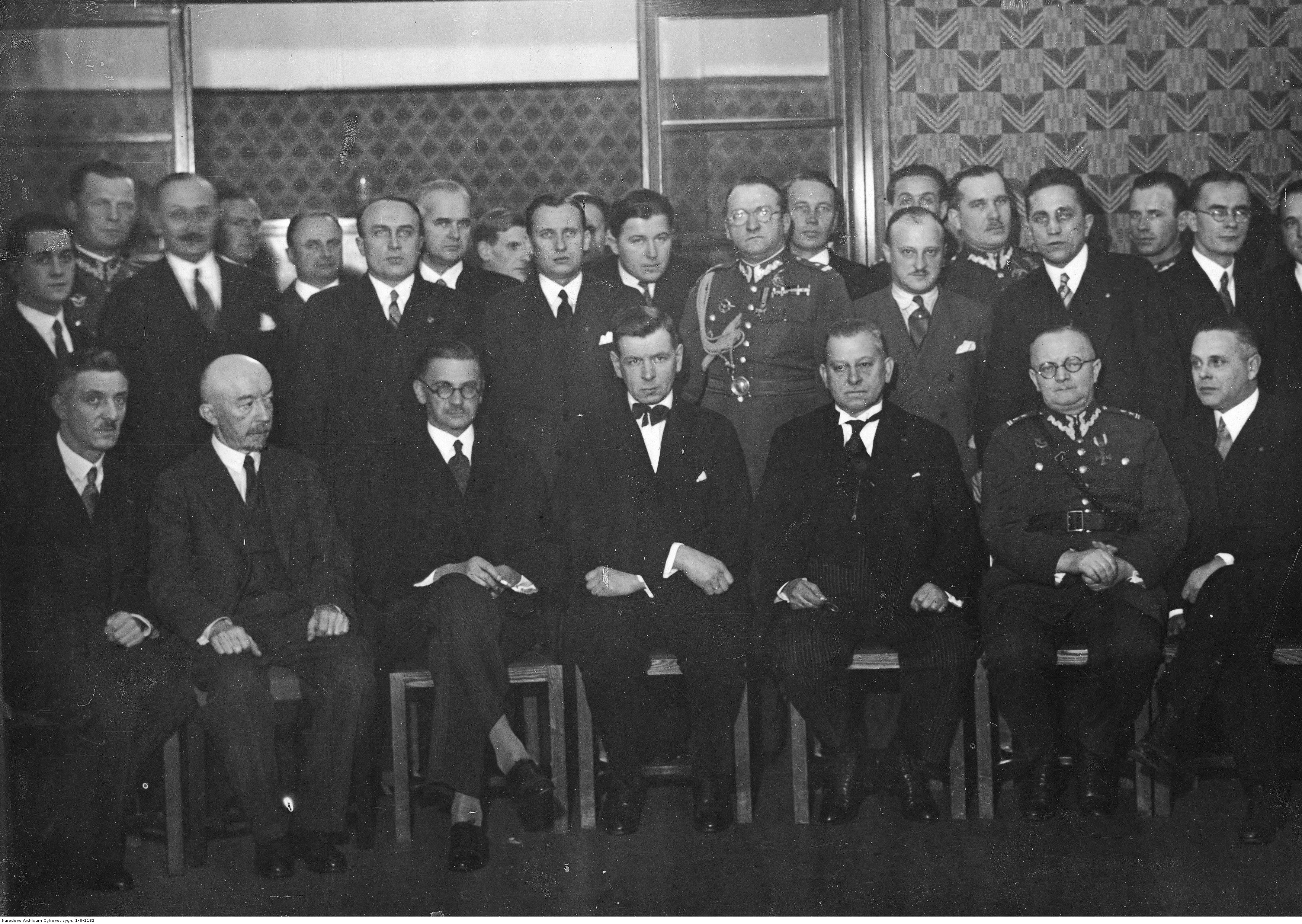 Obchody w Warszawie pięciolecia Aeroklubu RP. Fotografia grupowa uczestników obchodów. Widoczni m.in.: płk Ludomił Rayski (siedzi 4. z lewej), inz. Alfons Kuhn (siedzi 2. z lewej), prezes ZG Ligi Obrony Powietrznej i Przeciwgazowej Zenon Martynowicz (siedzi 3. z prawej), płk Czesław Filipowicz (siedzi 1. z lewej), prof. Czesław Witoszyński (siedzi 2. z lewej), ppłk Hilary Grabowski (siedzi 2. z prawej), ppłk Franciszek Wieden (siedzi 1. z prawej), sekretarz generalny Aeroklubu Polskiego mjr Bogdan Kwieciński (stoi w mundurze i okularach), kpt. Bolesław Orliński (stoi na lewo za B. Kwiecińskim), dyrektor Polskich Linii Lotniczych "LOT" Wacław Makowski (stoi za H. Grabowskim), prezes Aeroklubu Warszawskiego kpt. Tadeusz Halewski (stoi pod ścianą w mundurze na lewo za W. Makowskim), konstruktor lotniczy Jerzy Wędrychowski (stoi 1. z lewej), konstruktor lotniczy Jerzy Drzewiecki (stoi 1. z prawej w okularach), kpt. Ignacy Giełgowd (stoi 2. z lewej). Koncern Ilustrowany Kurier Codzienny - Archiwum Ilustracji. Sygnatura: 1-S-1182